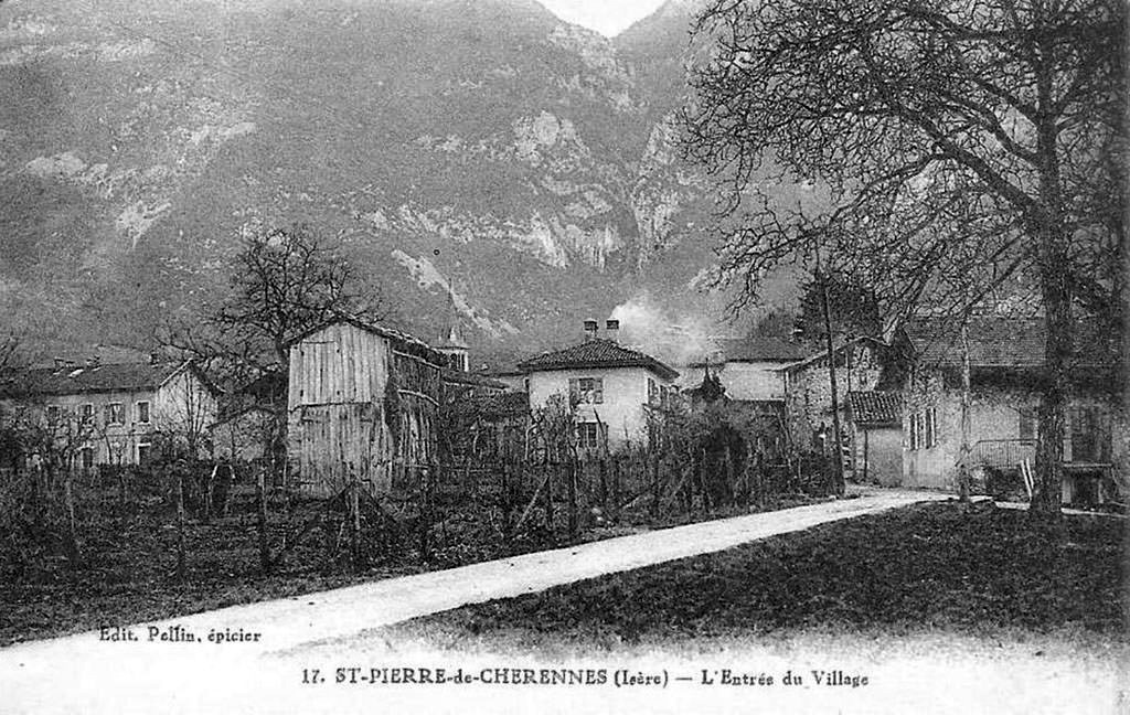 Saint-Pierre-de-Chérennes (Isère) - L'entrée du village